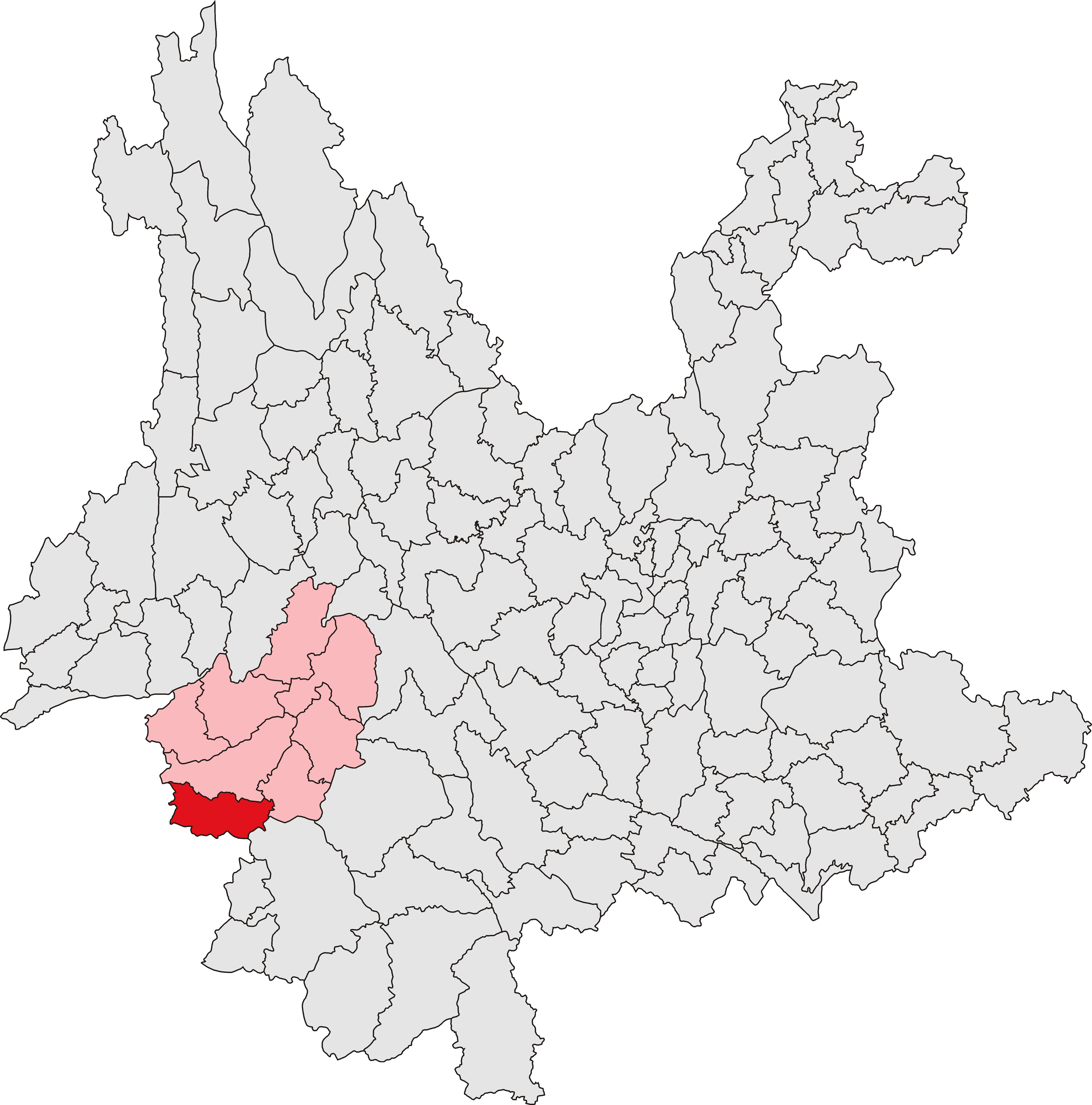 中文（中国大陆）: 沧源佤族自治县位置图